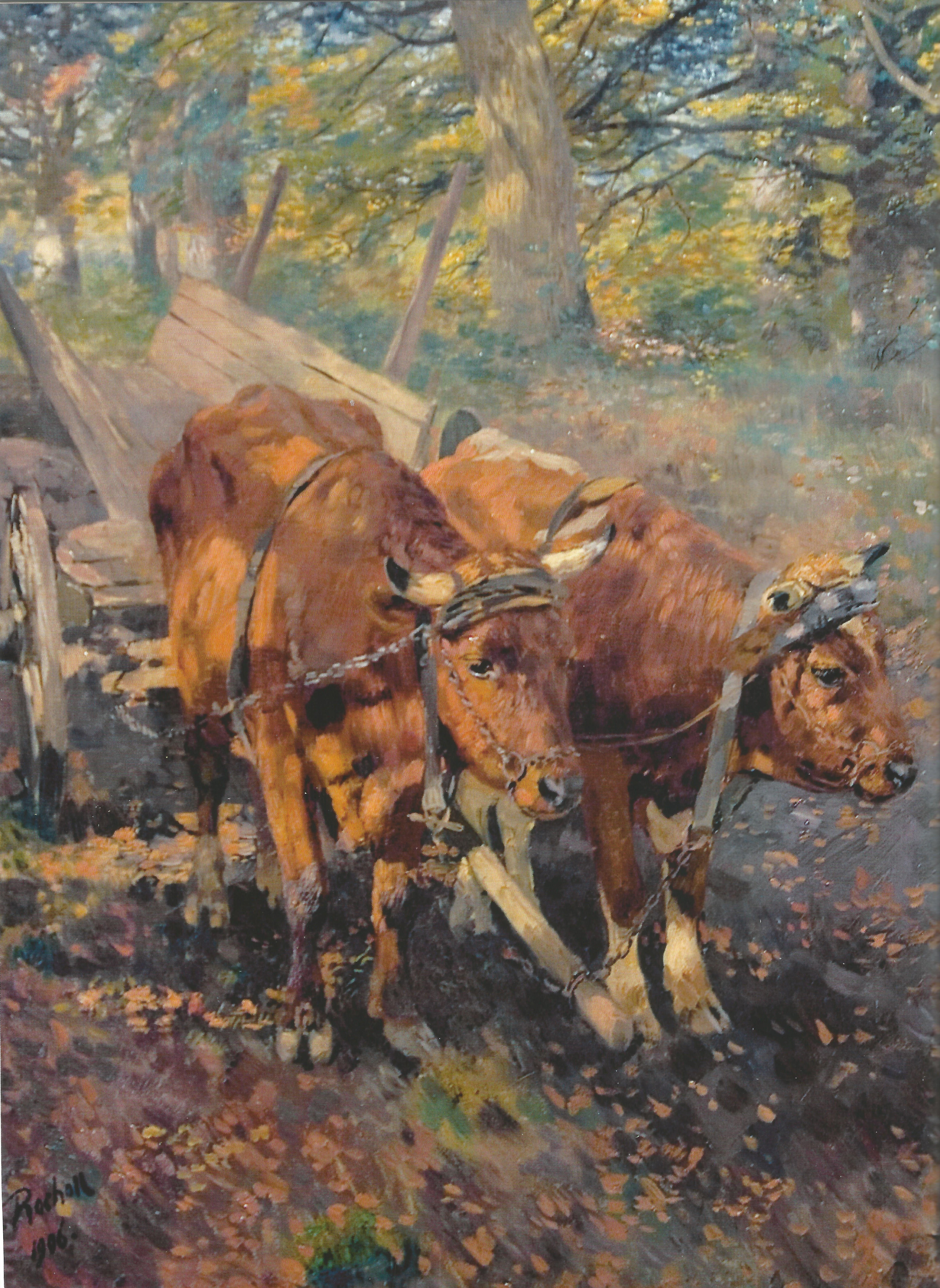 Orginaltitel: "Gespann des alten Neumann an der Sababurger Mühle vor den Bäumen des Urwalds"; Gemälde einer Eiche aus dem "Urwald Sababurg"; Theodor Rocholl; 1906